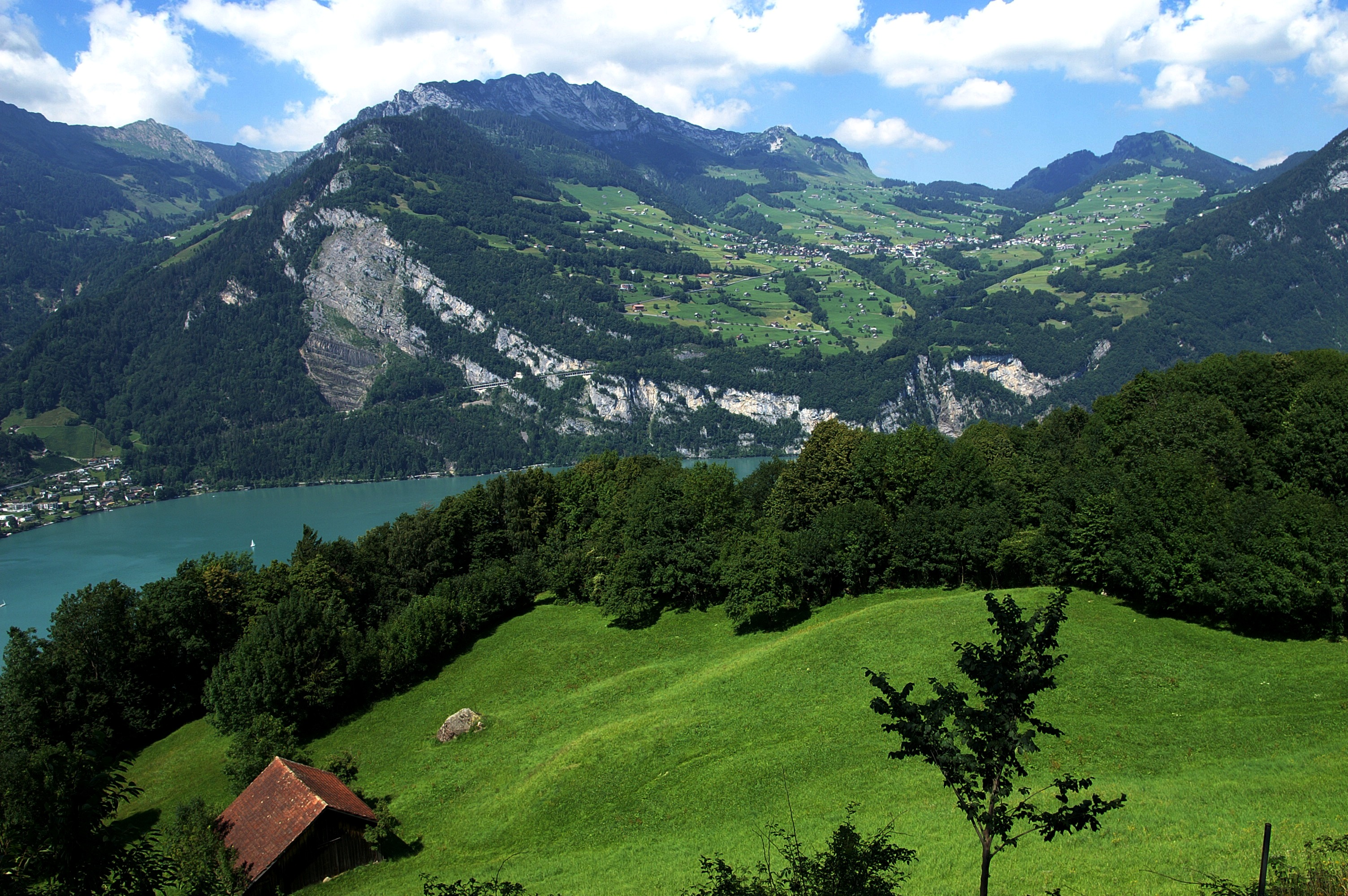 Amden ist eine politische Gemeinde im Kanton St. Gallen. Sie wird als „Sonnenterrasse“ des Walensees bezeichnet. Blick von Filzbach, auf dem Kerenzerberges.